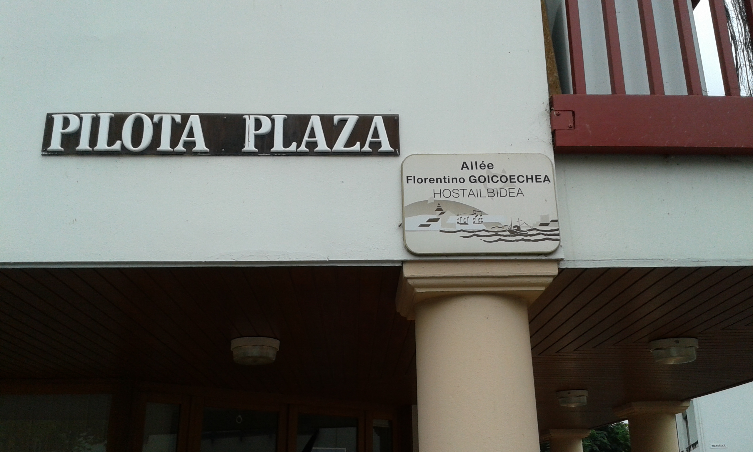 Allée Florentino Goicoechea Ziburun